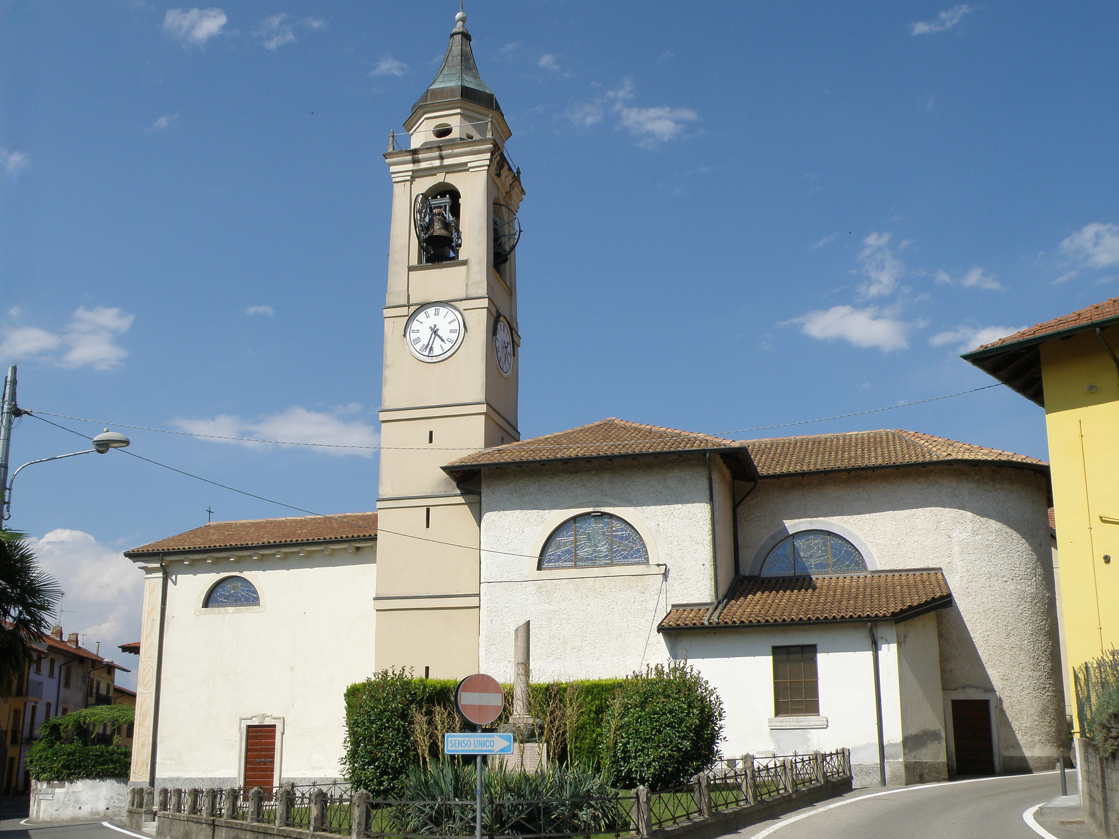 Ranco (VA). Chiesa parrocchiale di San Martino e Lorenzo.